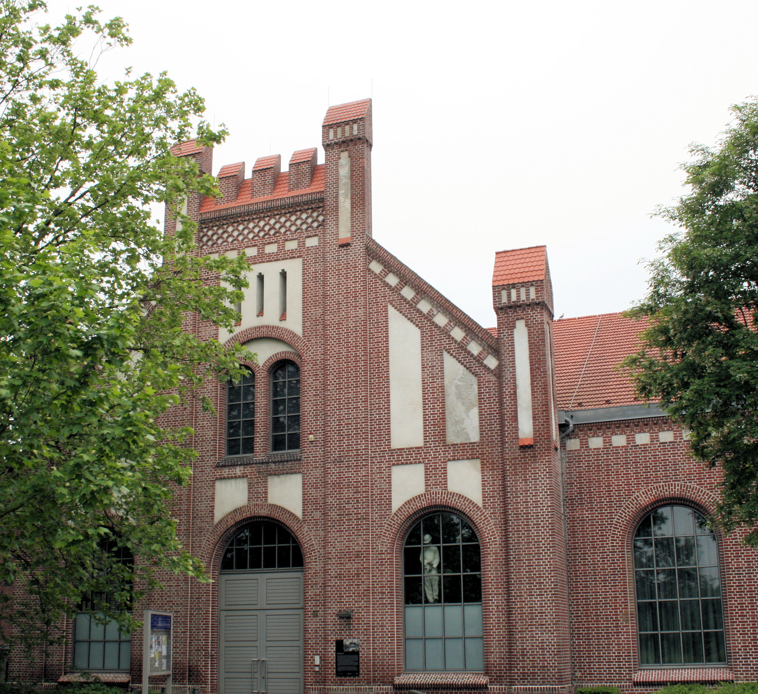 Alte Schmiede Zeche Hansa Dortmund 1905 errichtet im Stil der niederdeutschen Backsteingothik Architekt: Paul Knobbe